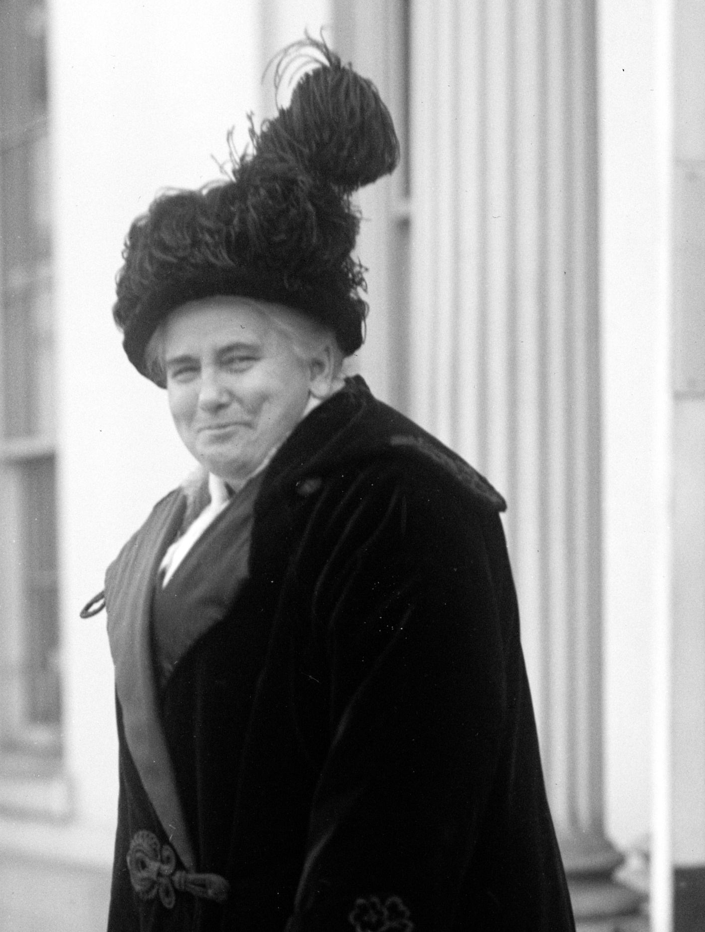 SHAW, DR. ANNA HOWARD. PRESIDENT, N.A.W.S.A., 1904